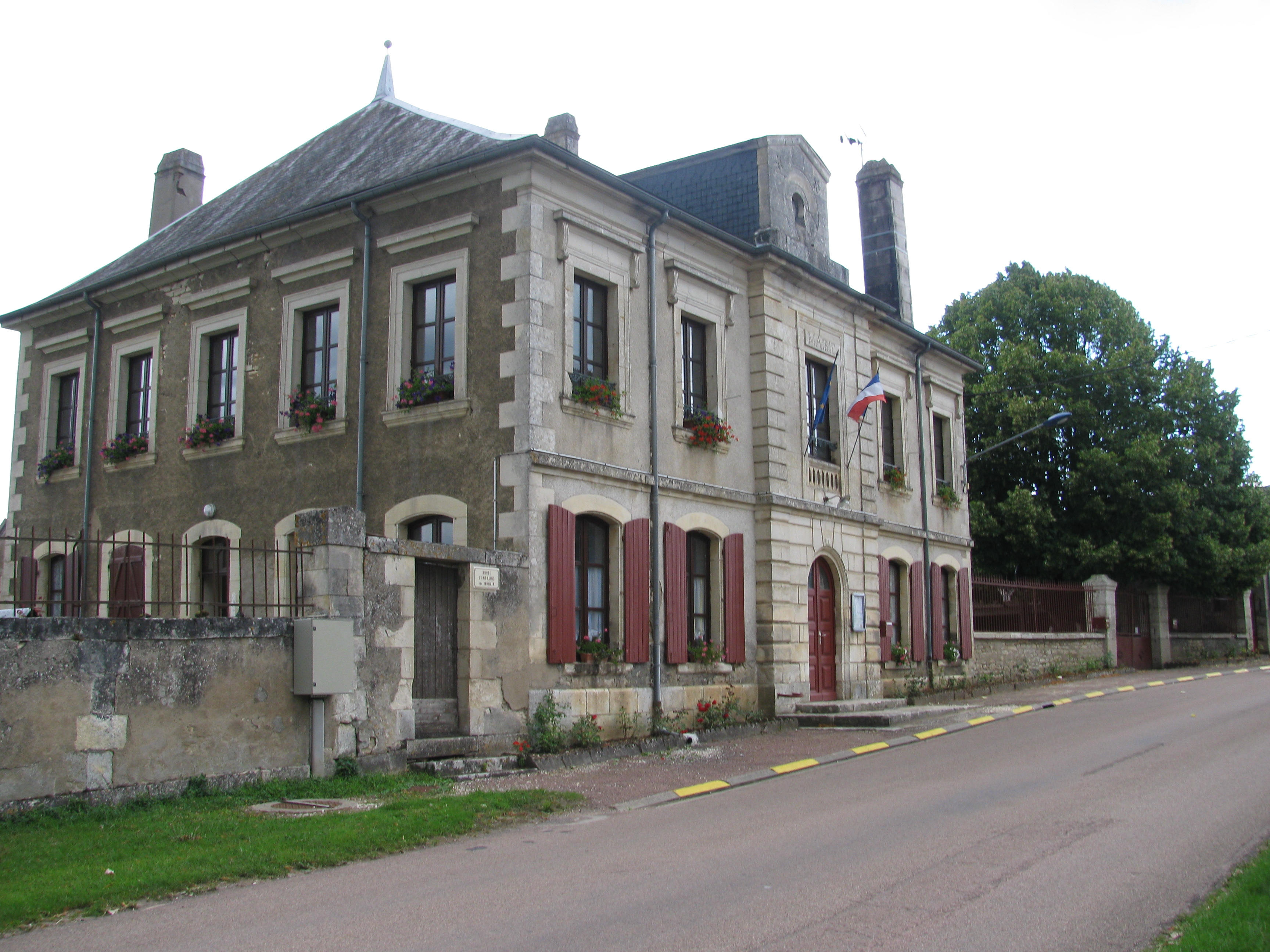 Mairie-école de Couloutre, Nièvre.